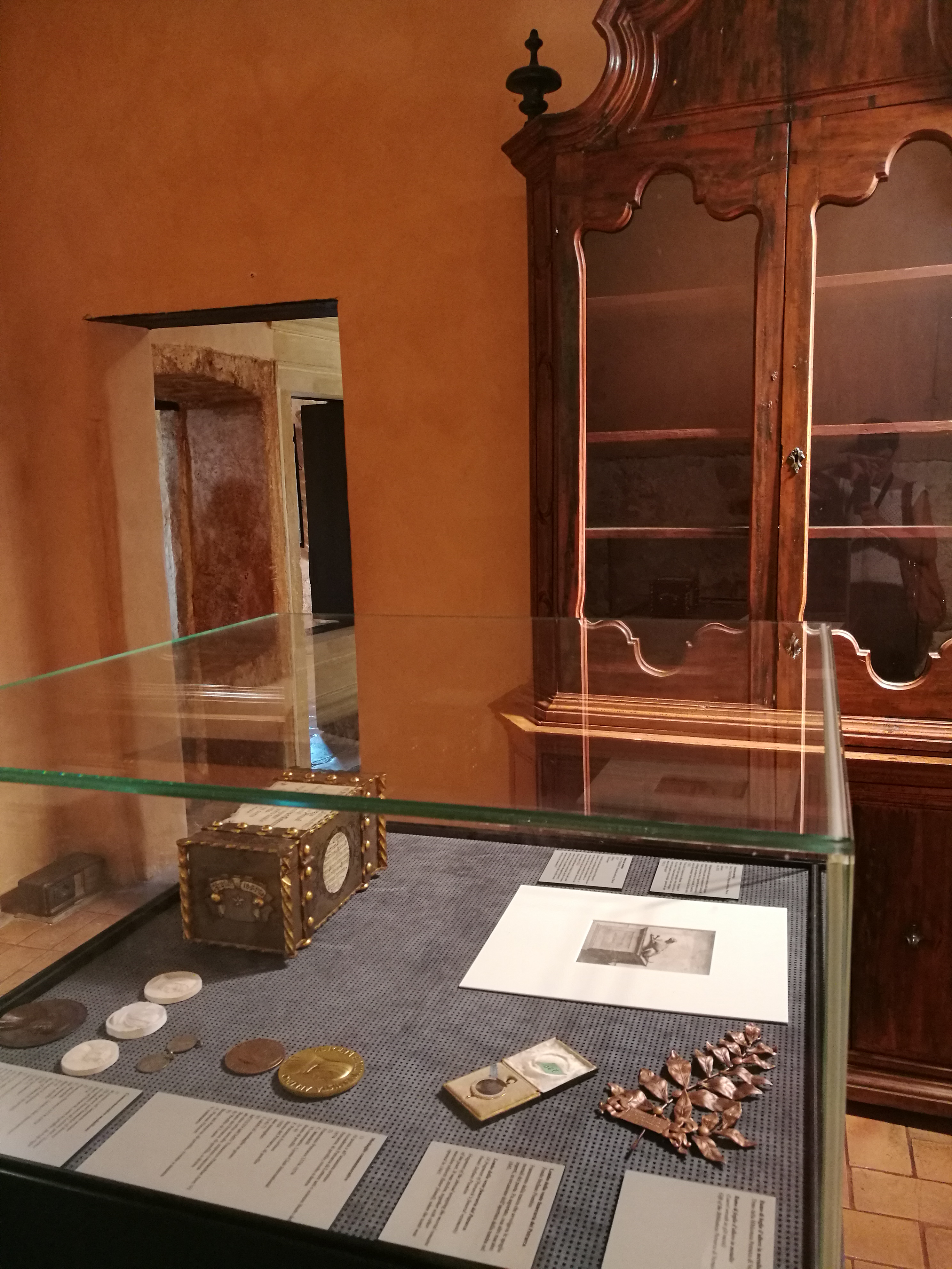 casa del Petrarca This is a photo of a monument which is part of cultural heritage of Italy.